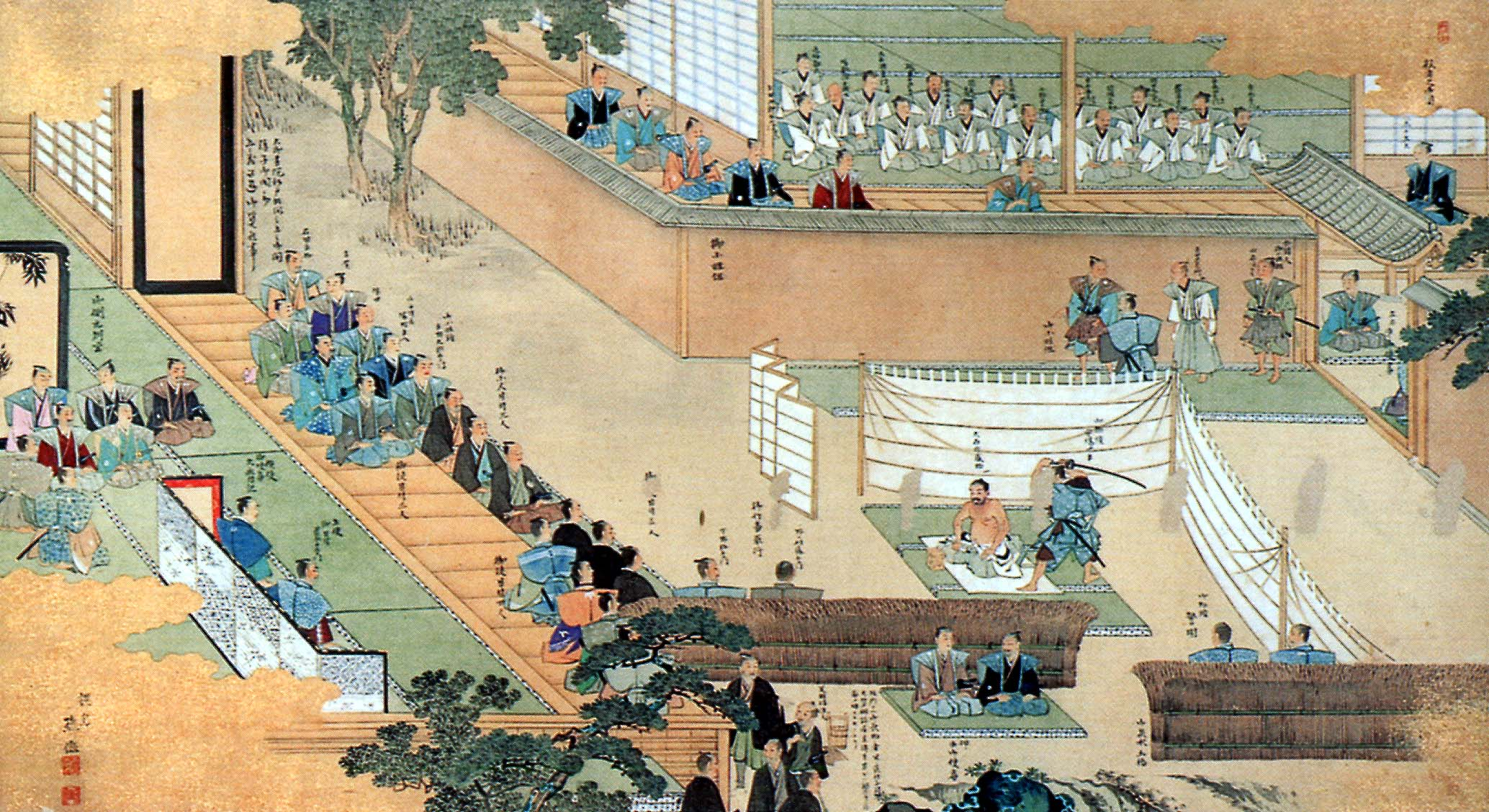 『大石内藏助良雄切腹之圖』Ōishi Kuranosuke Yoshio Sepuku no Zu (The Harakiri of Ōishi Kuranosuke Yoshio)